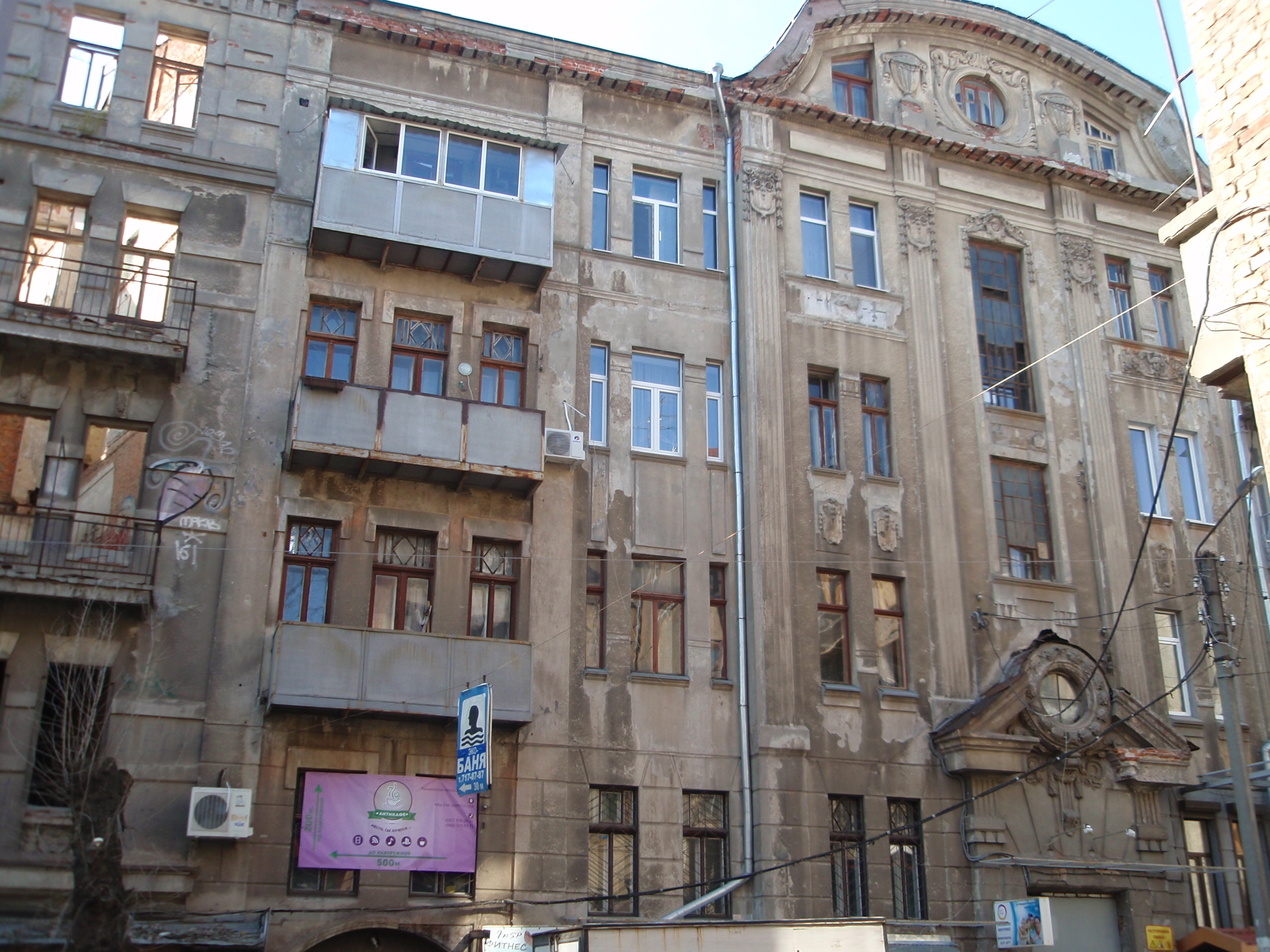 Житловий будинок, Харків, вул. Маршала Бажанова, 6